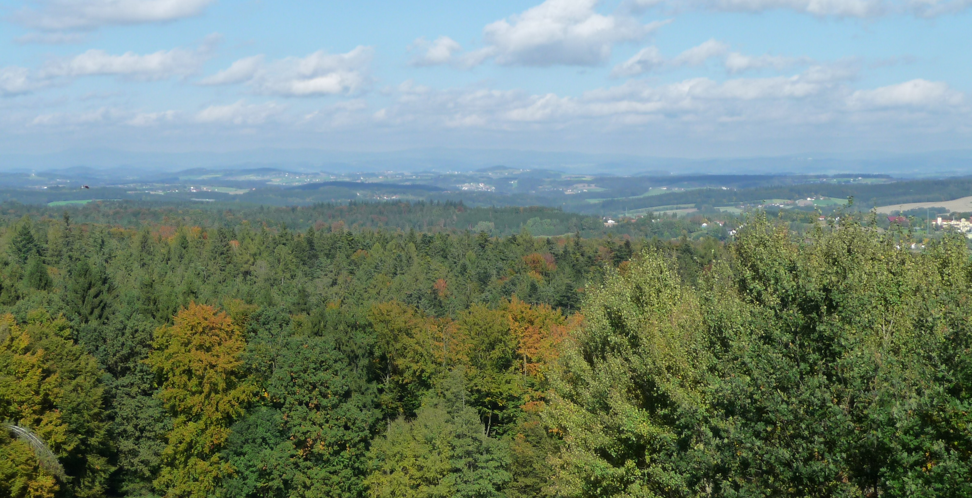 Blick von der "Platte" auf den Neuburger Wald